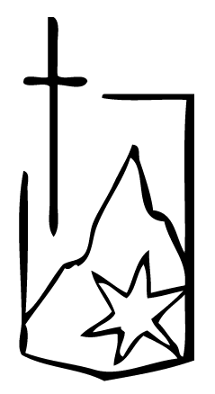 Emblema de la Congregació de les Germanes Carmelites de la Caritat, inspirat en l'emblema de l'Orde del Carmel.